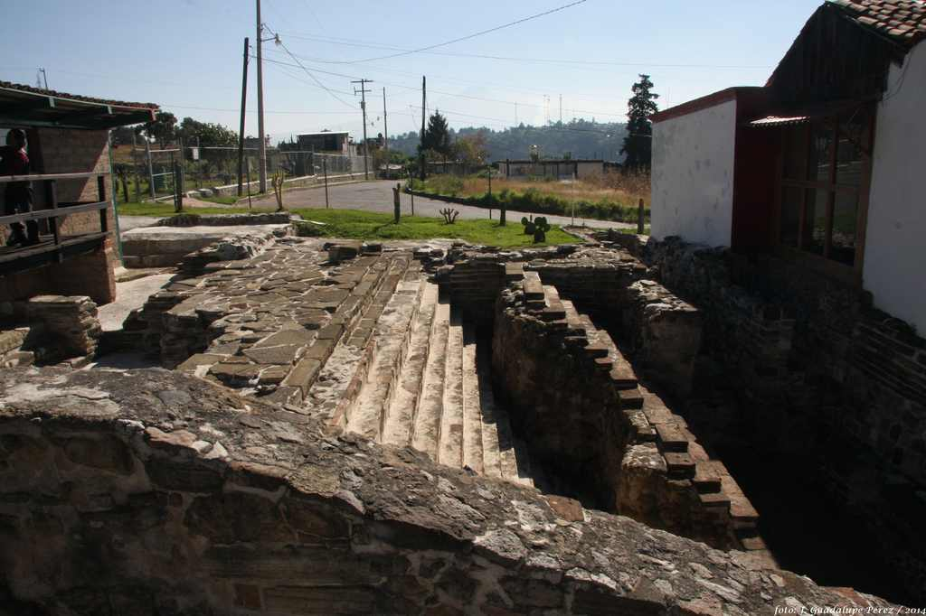 Totolac, Tlaxcala Foto: J. Guadalupe Pérez /2014